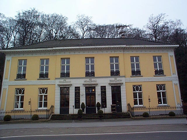 Villa Belriguardo in Kleve; sie wurde 1840 erbaut und 1999 restauriert.